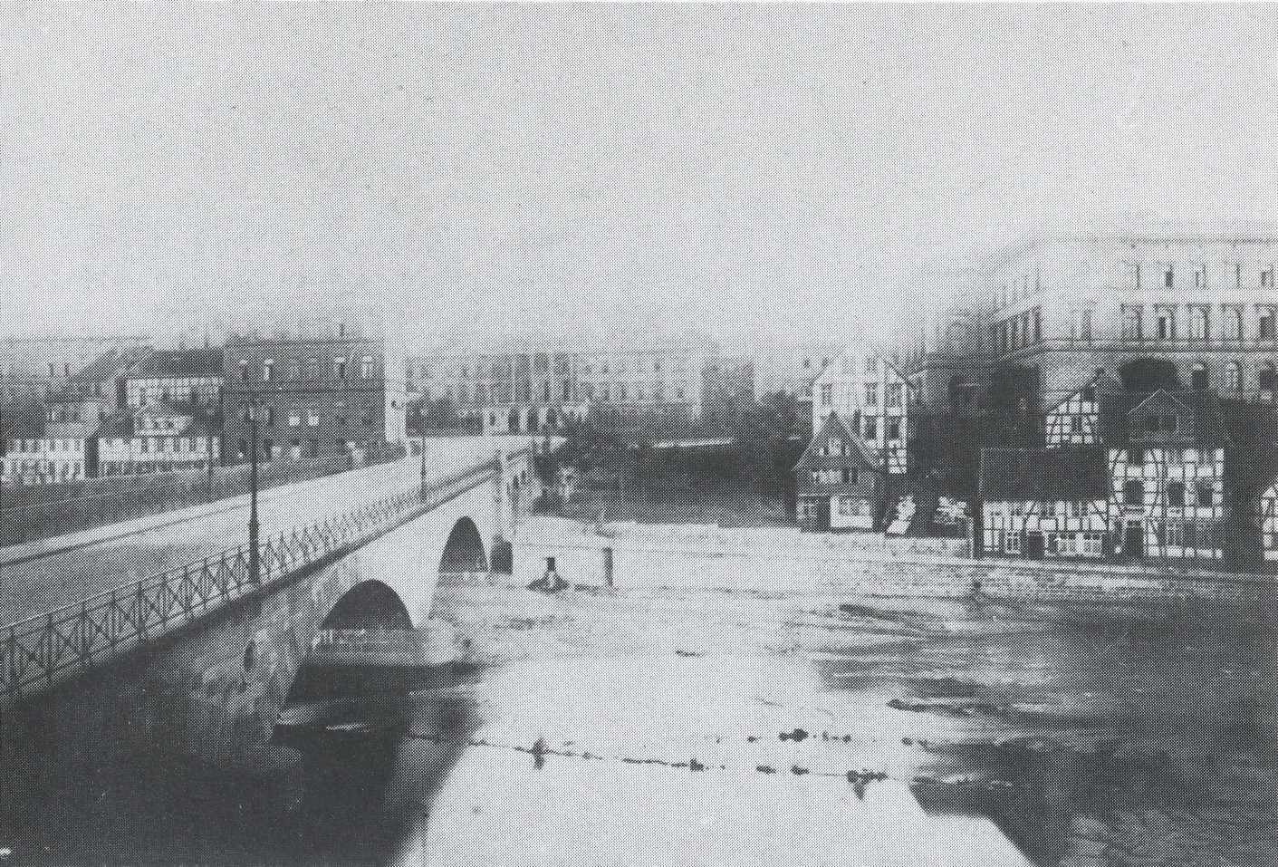 Wuppertal Döppersberger Brücke um 1870 (nach 1875, Die Reichsbahndirektion steht schon)